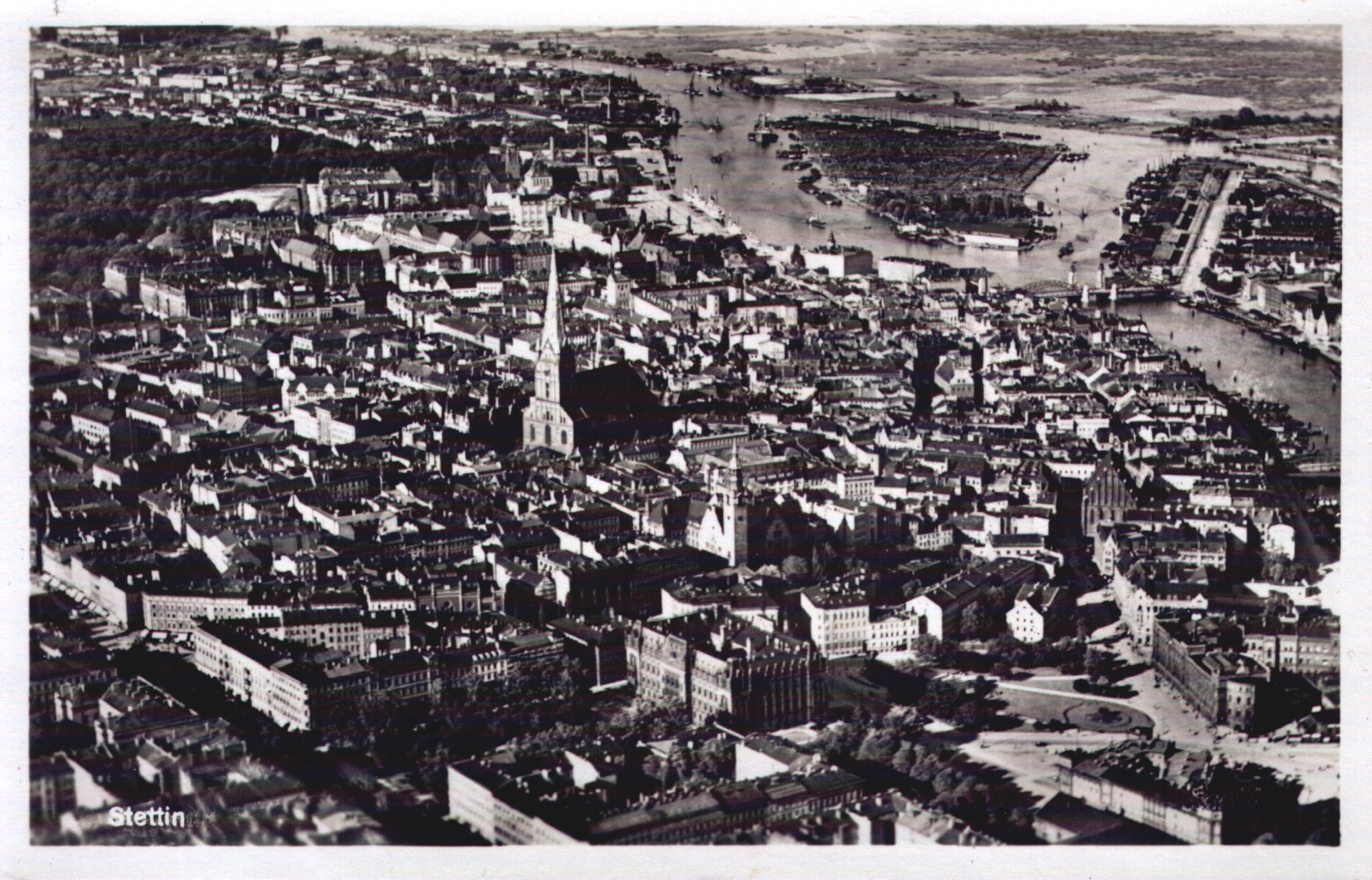 Szczecin na starej fotografii